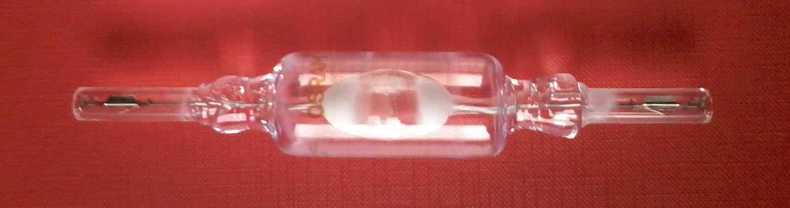 знято мобілкою Самсунг